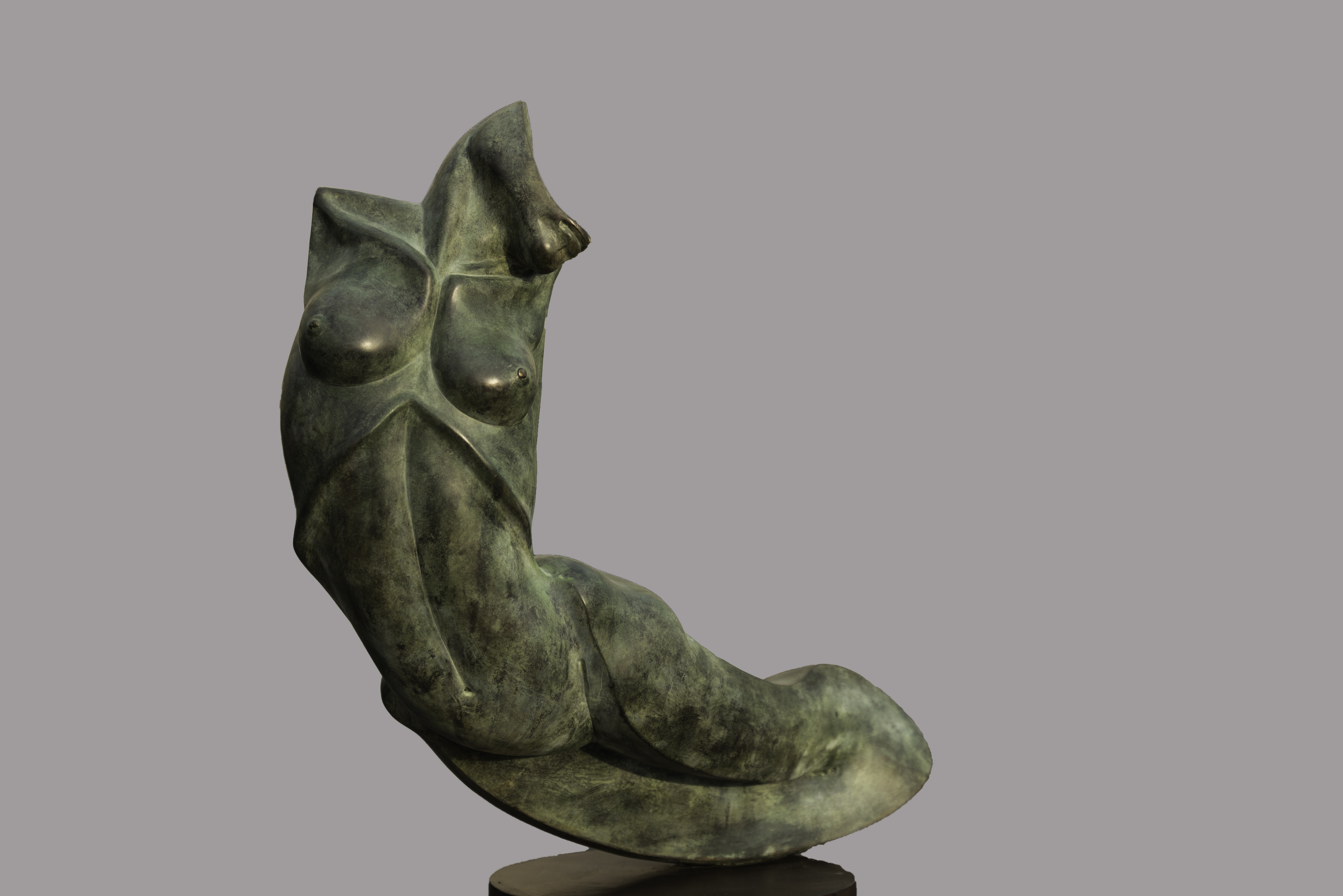 ESCULTURA DE MUSTAFA ARRUF TITULADA "CUERPO DE MUJER" (2002)